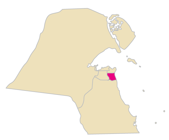 Mubarak Al-Kabeer